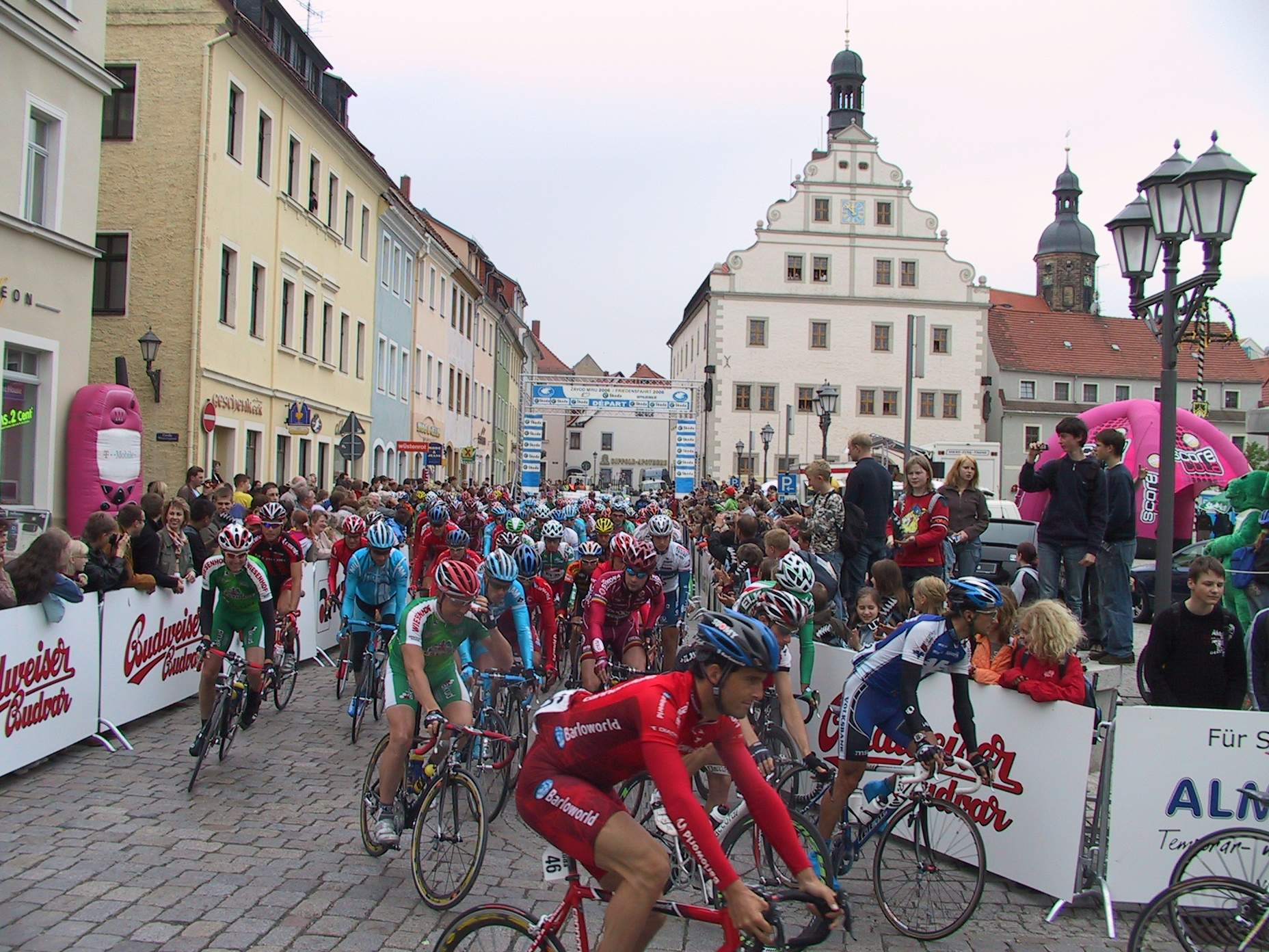 Ehrenstart der 6. Etappe der 58. Friedensfahrt am 18. Mai 2006 in Dippoldiswalde.